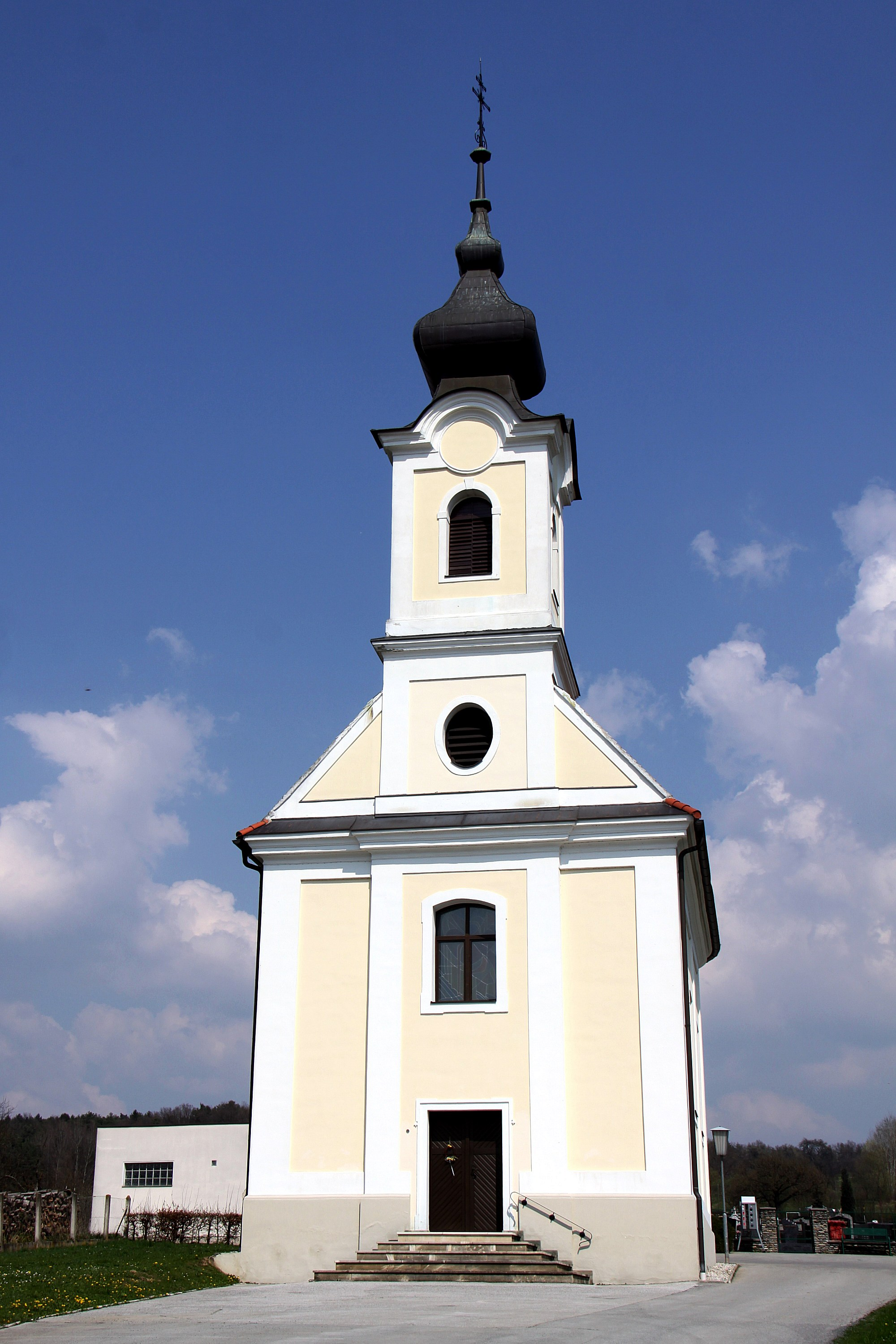 Riedlingsdorf - katholische Filialkirche hl. Urban Object location47° 20′ 44.21″ N, 16° 08′ 14.75″ E